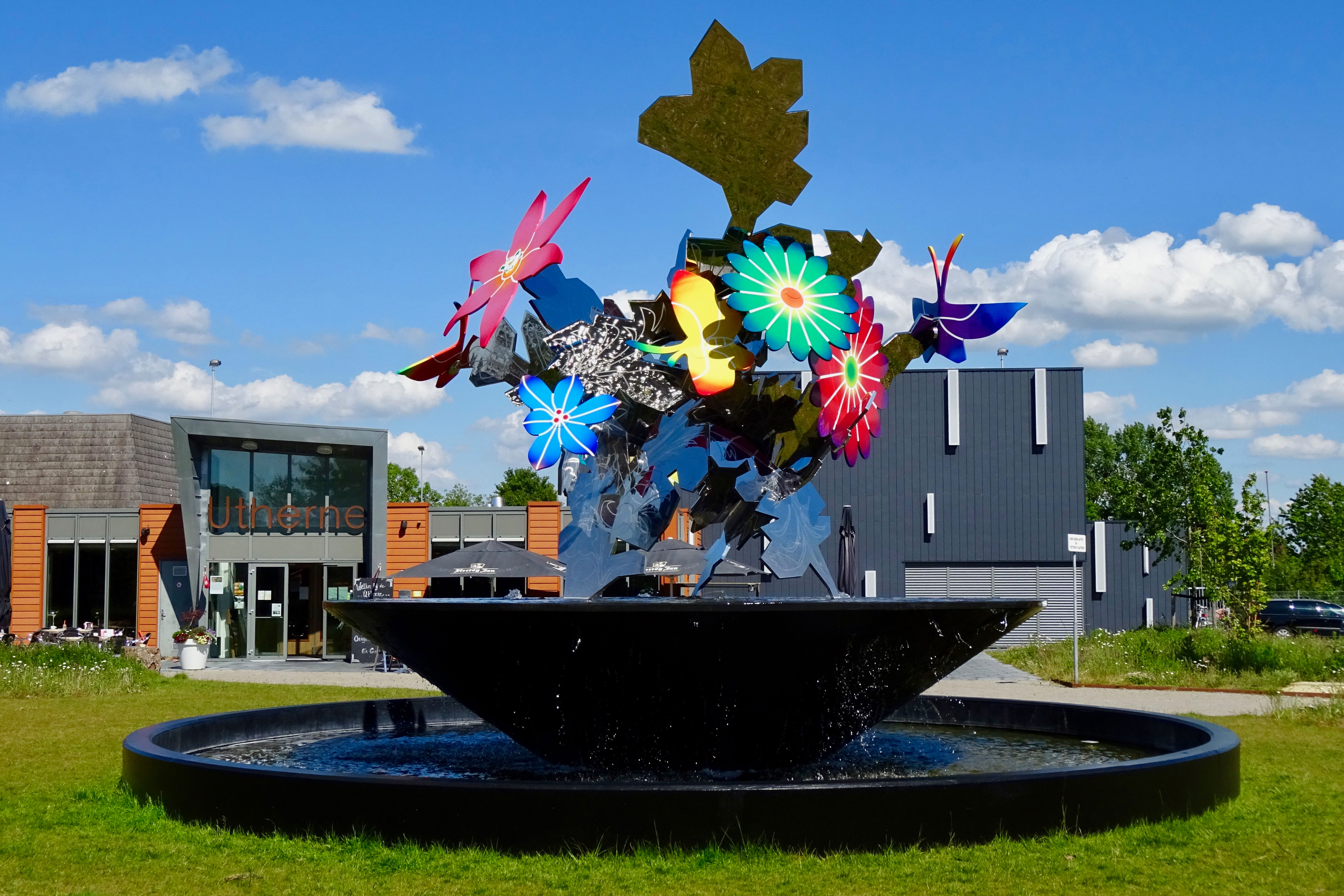 Rikka fontein door Shinji Ohmaki in IJlst